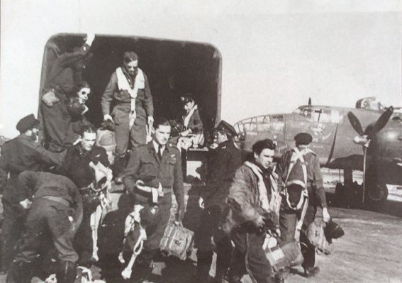 Boy Thomann (in het midden) als Airgunner bij 320 Dutch Squadron RAF